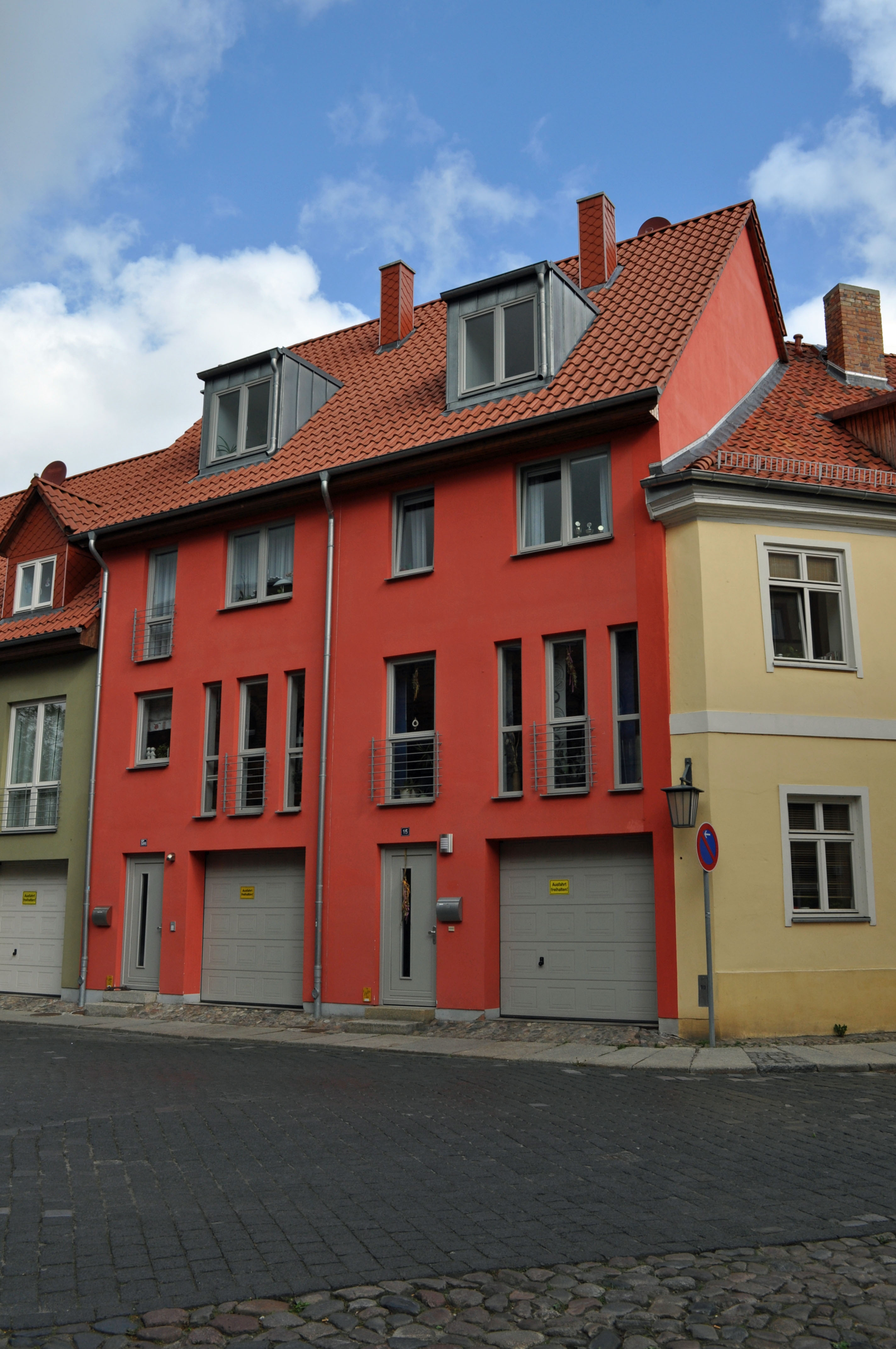 Gebäude in Stralsund, siehe Dateiname